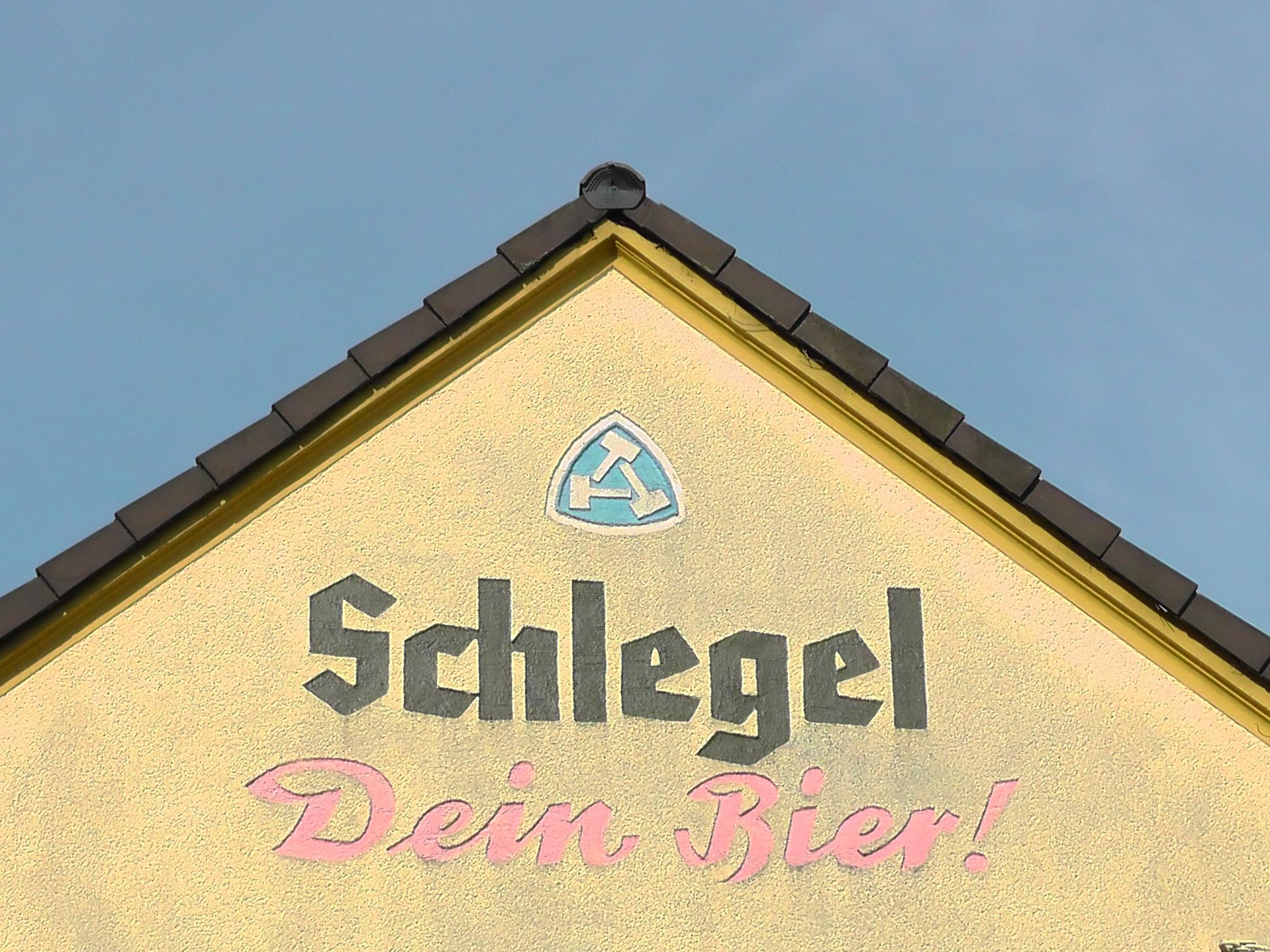 Werbung der Schlegelbrauerei an einer Hauswand in Wattenscheid